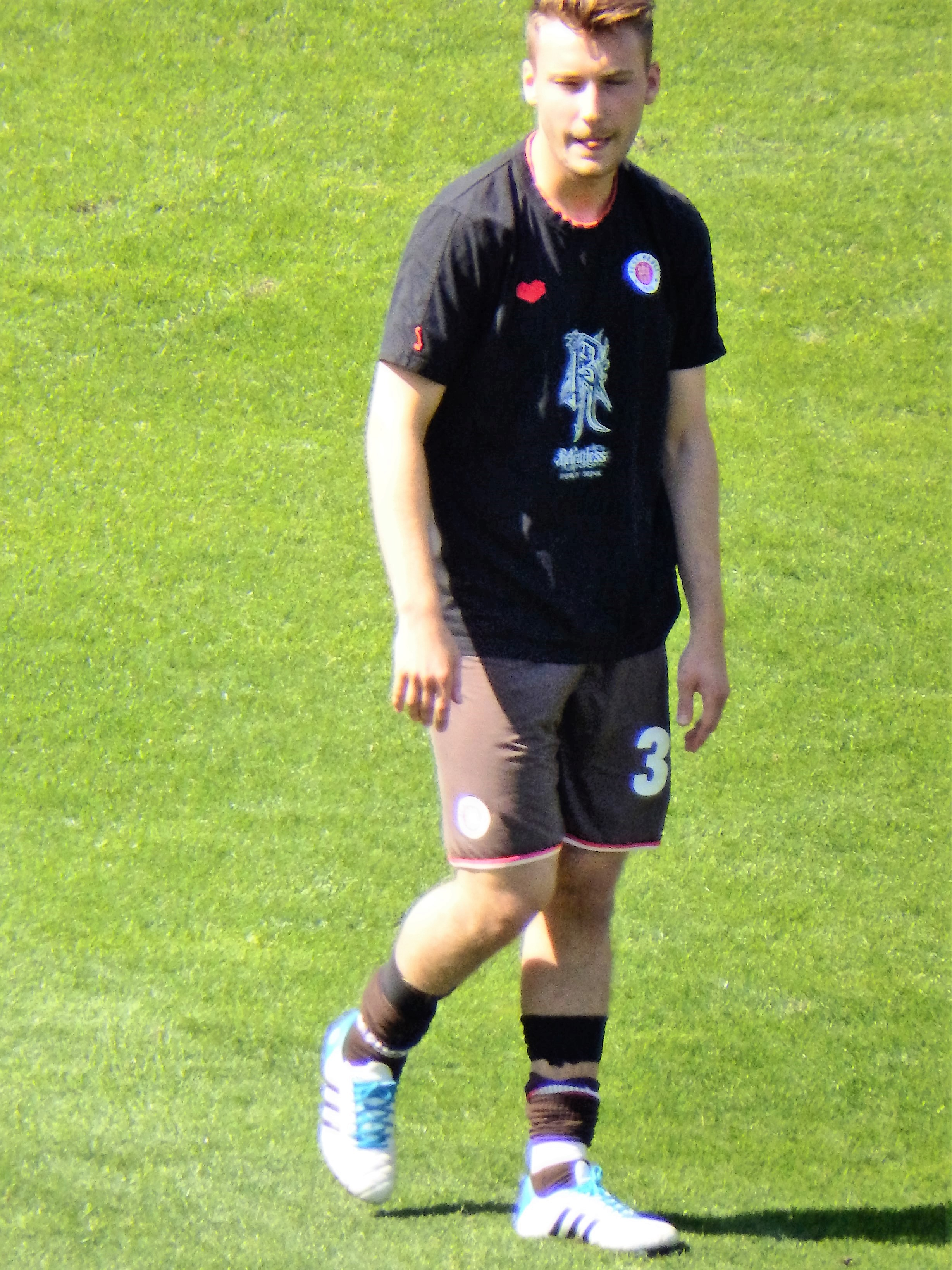 Trybull, Tom FCSP